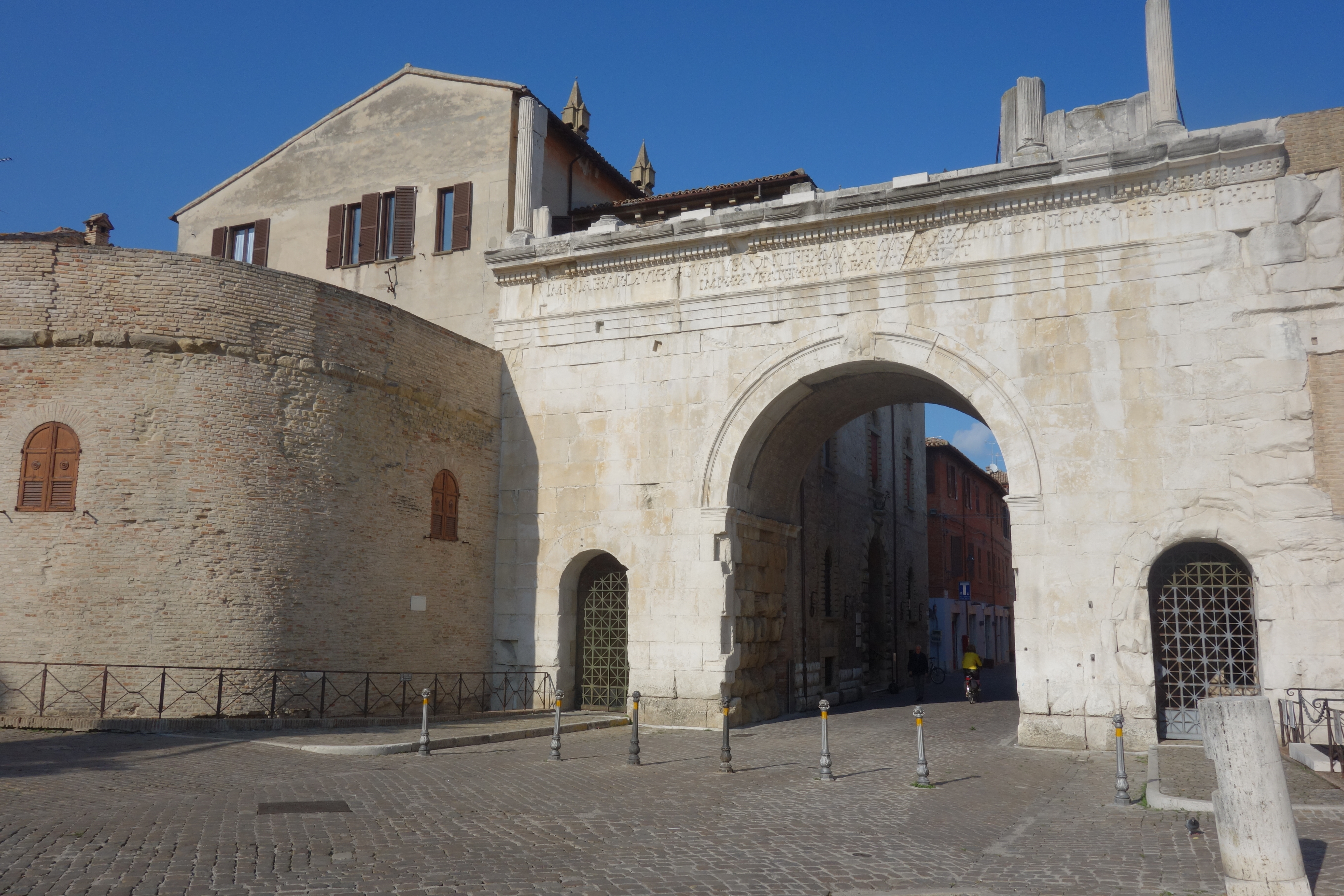 Veduta d'insieme This is a photo of a monument which is part of cultural heritage of Italy.